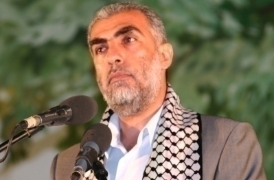 סגן יושב ראש הפלג הצפוני של התנועה האיסלאמית